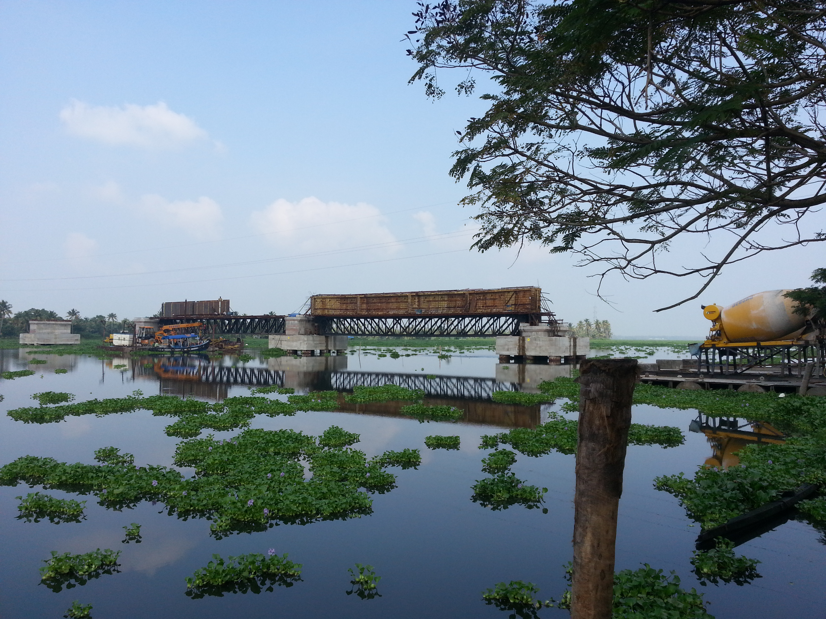 തുറവൂർ-പമ്പാ പാതയിലെ പ്രധാന പാലങ്ങളിലൊന്നായ തൈക്കാട്ടുശ്ശേരി പാലത്തിന്റെ നിർമാണം